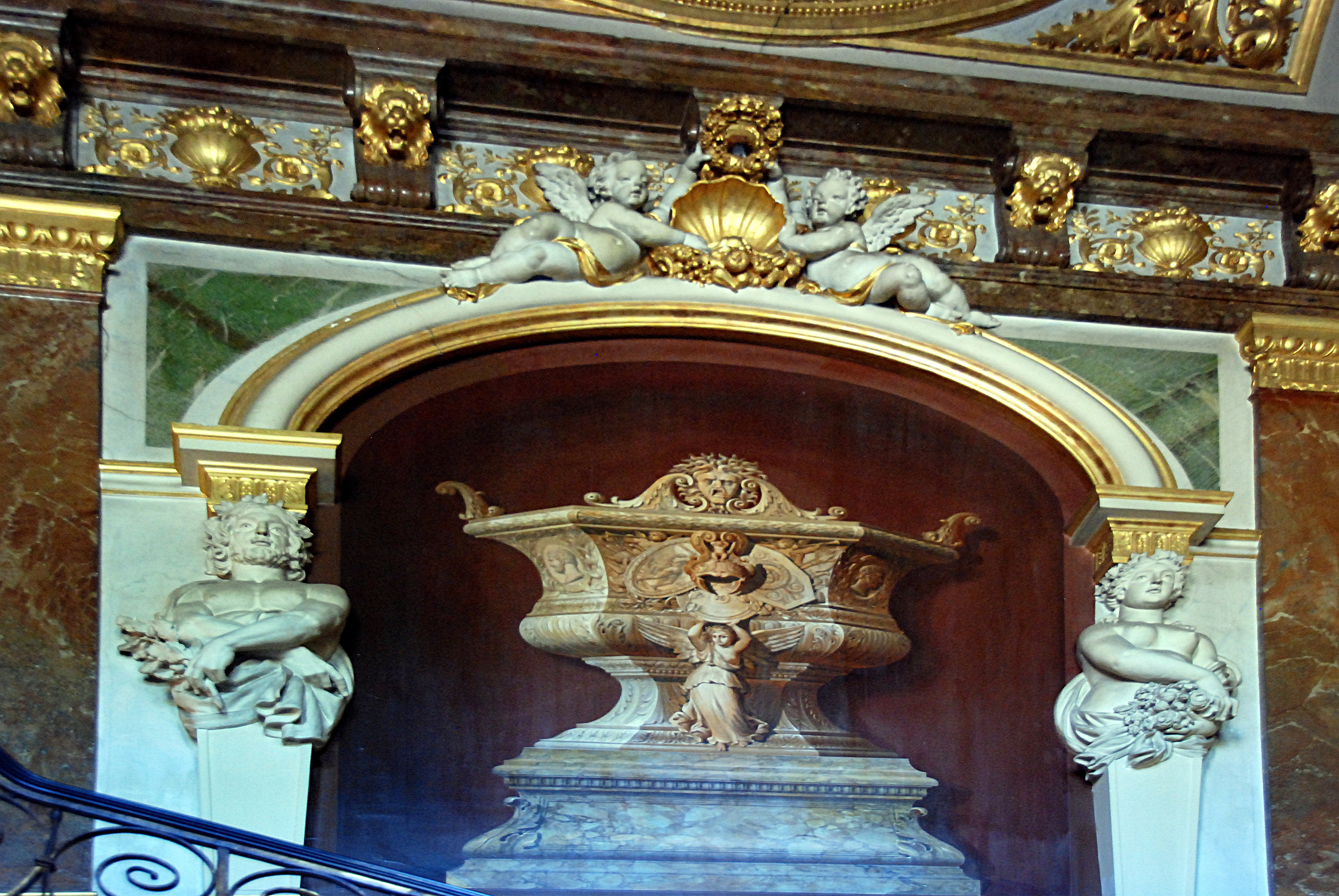 un trompe l’œil dans l'escalier principal